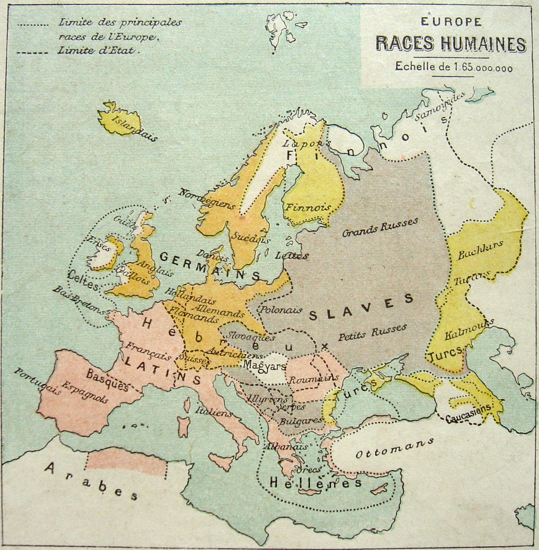 Europe : Races humaines